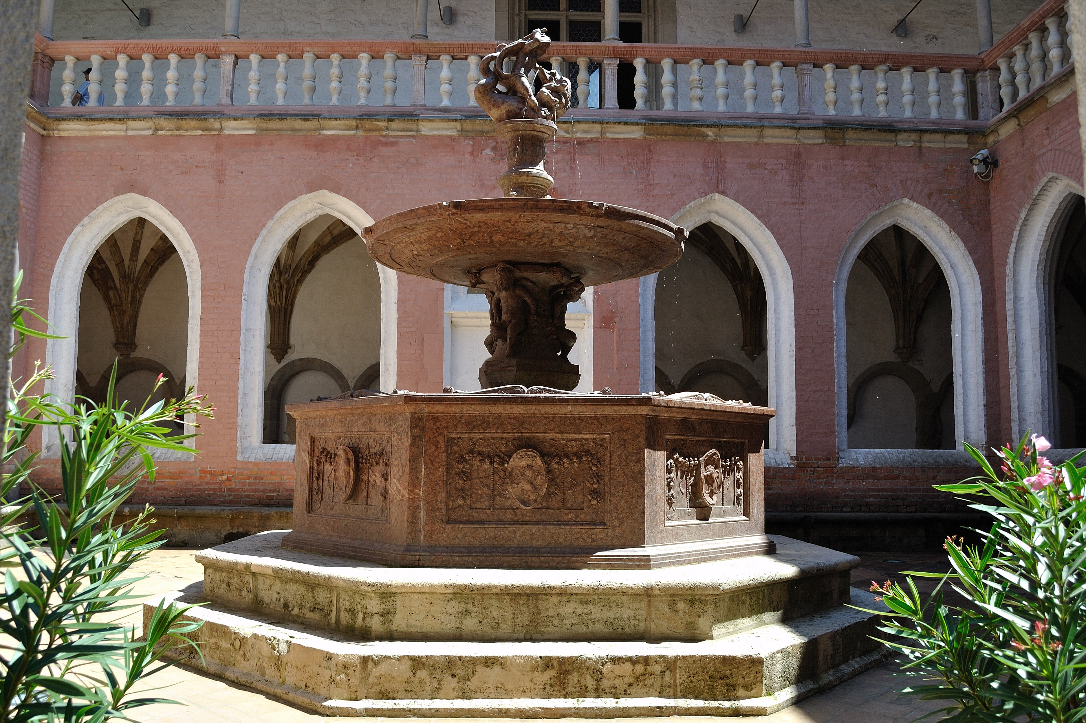 A királyi palota teljes romterülete, Visegrád – Herkules-kút a díszudvaron This is a photo of a monument in Hungary. Identifier: 91325